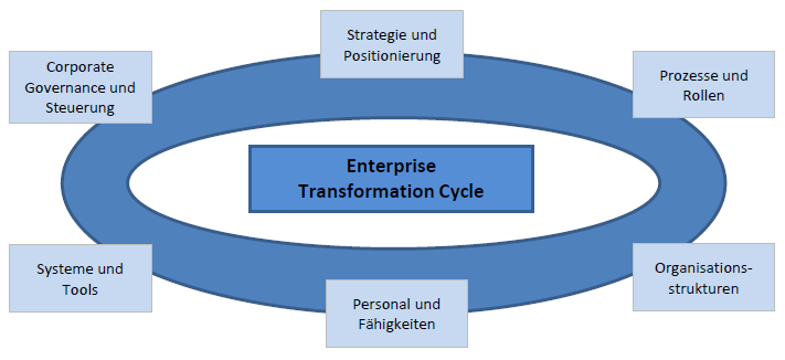 Phasen des Enterprise Transformation Cycles (eigene Darstellung in Anlehung an: Kaschny, Martin / Nolden, Matthias / Schreuder, Siegfried: Innovationsmanagement im Mittelstand- Strategien, Implementierung, Praxisbeispiele. Springer Gabler, Wiesbaden 2015, S. 4)